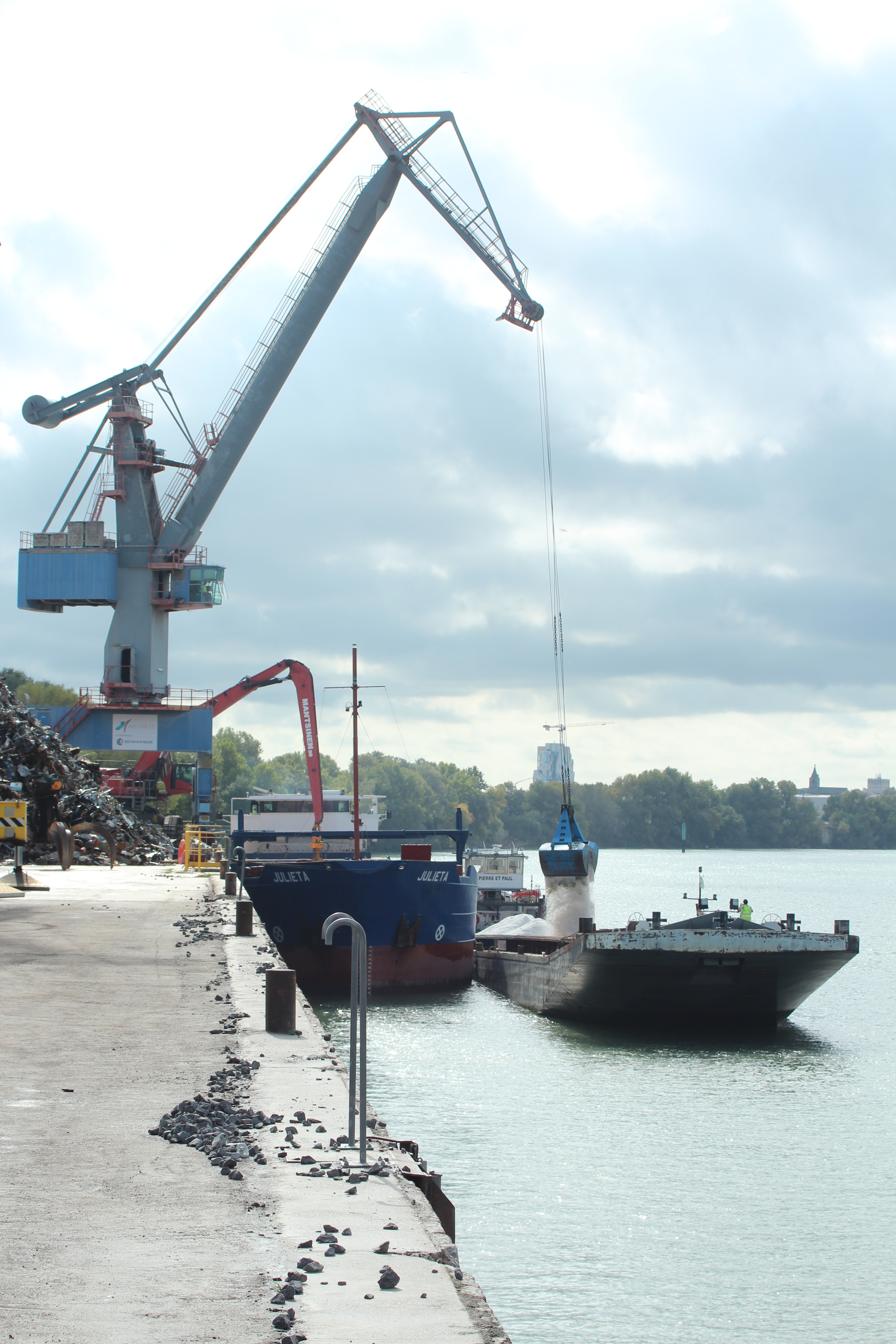 Un des quais de déchargement du port fluvial d'Arles.